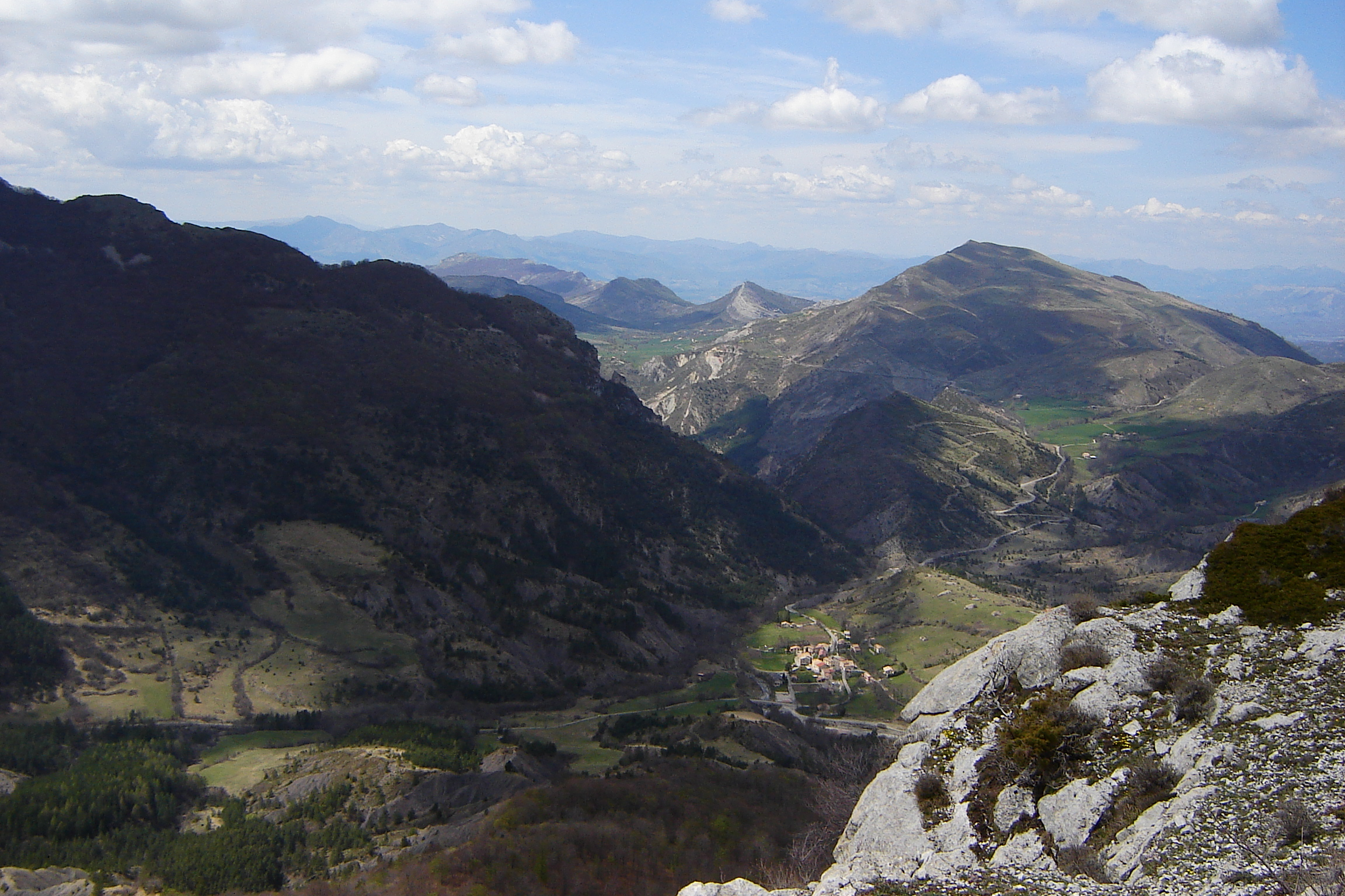 Le village d'Authon (04) vu du Geruen